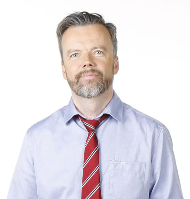 Lars Lindström, journalist och krönikör på Expressen